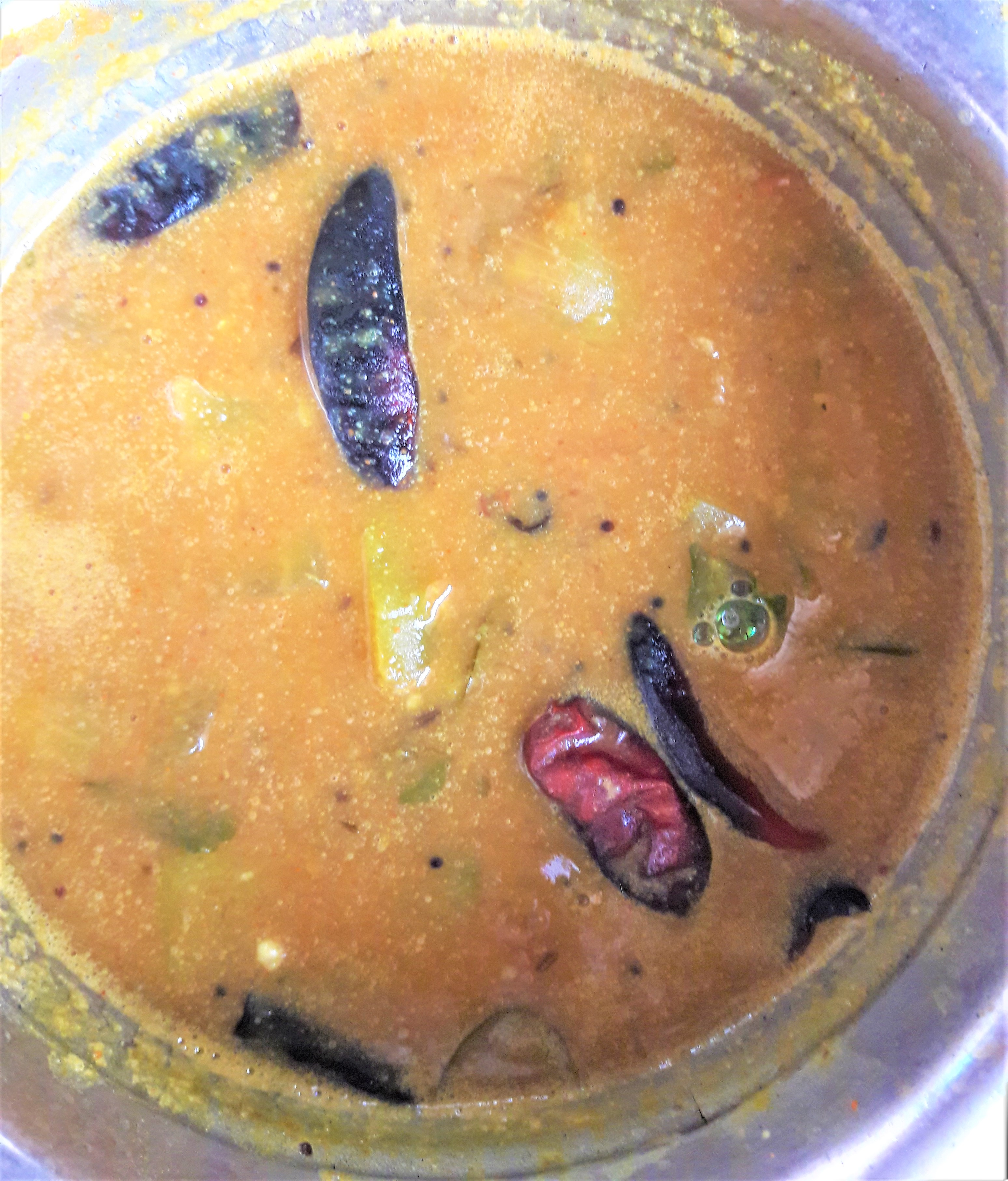 పప్పు పులుసు